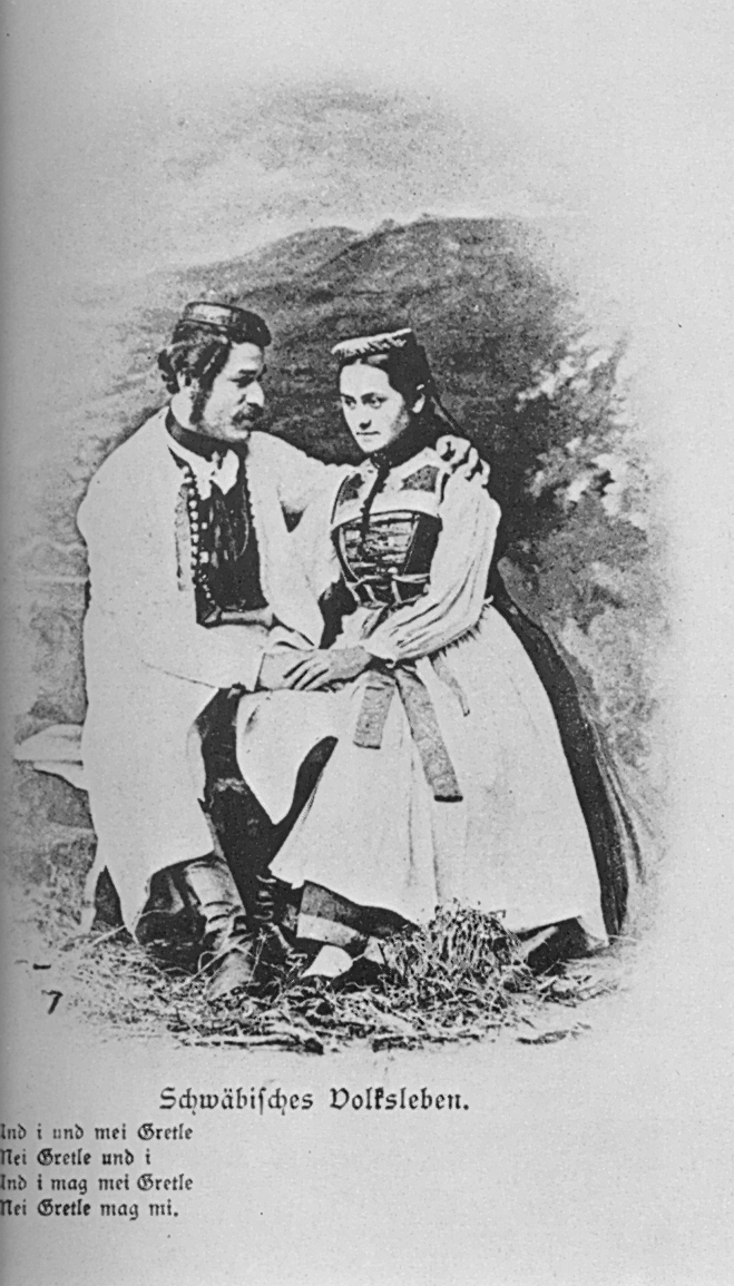 Schwäbisches Volksleben, „Und i und mei Gretele“, Postkarte